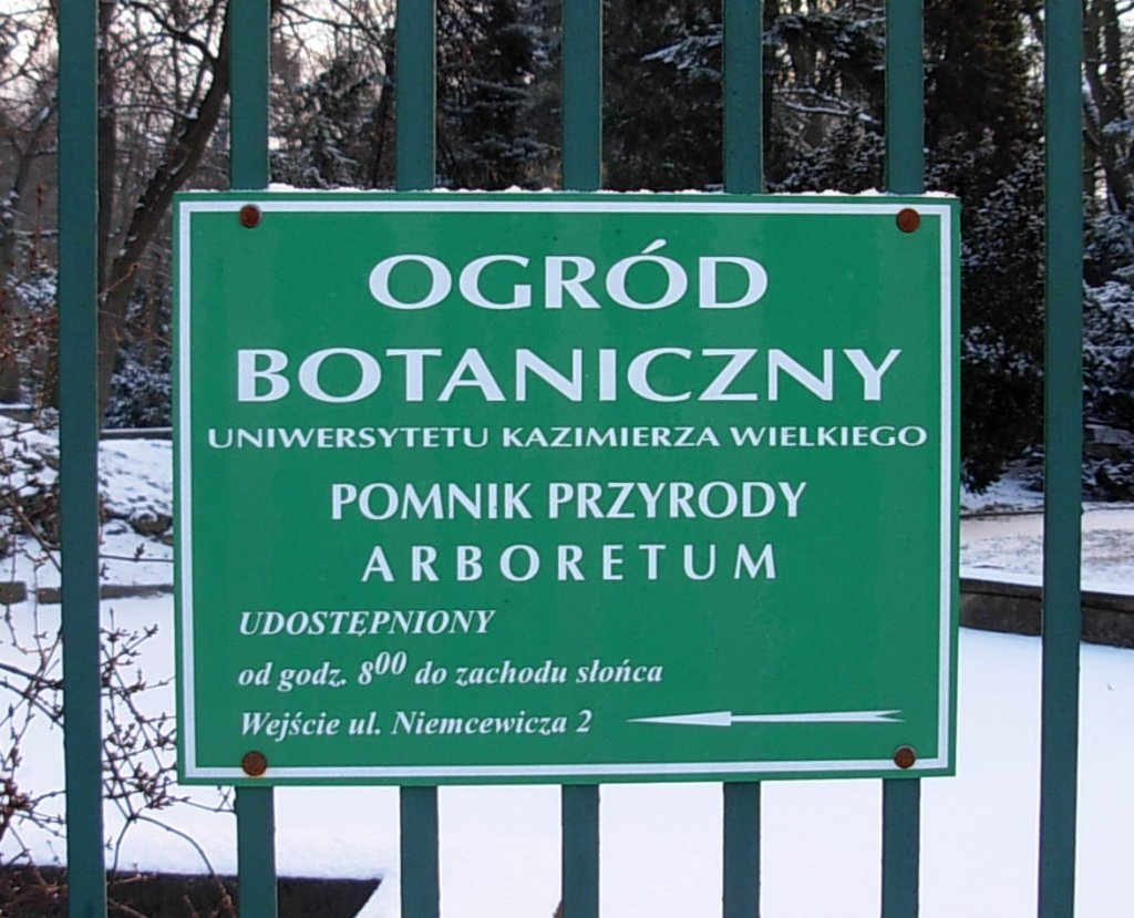 Arboretum w Bydgoszczy